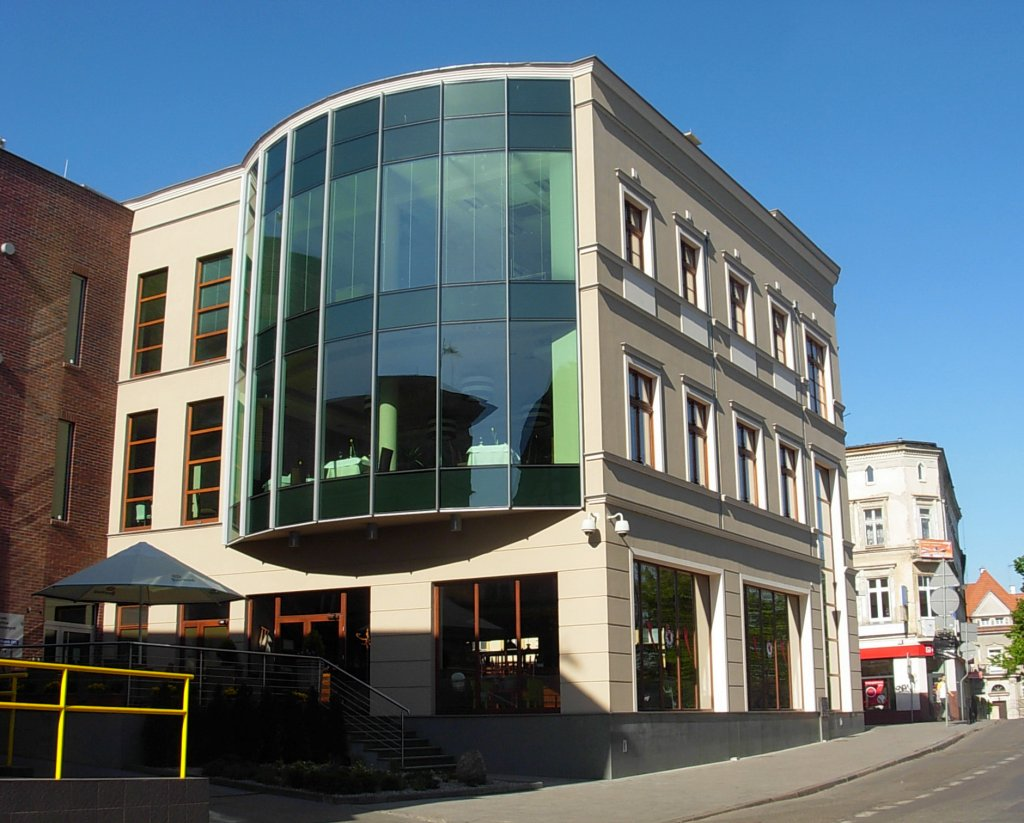 Kamienica na ul. Mostowej w Bydgoszczy - widok od ul. Grodzkiej